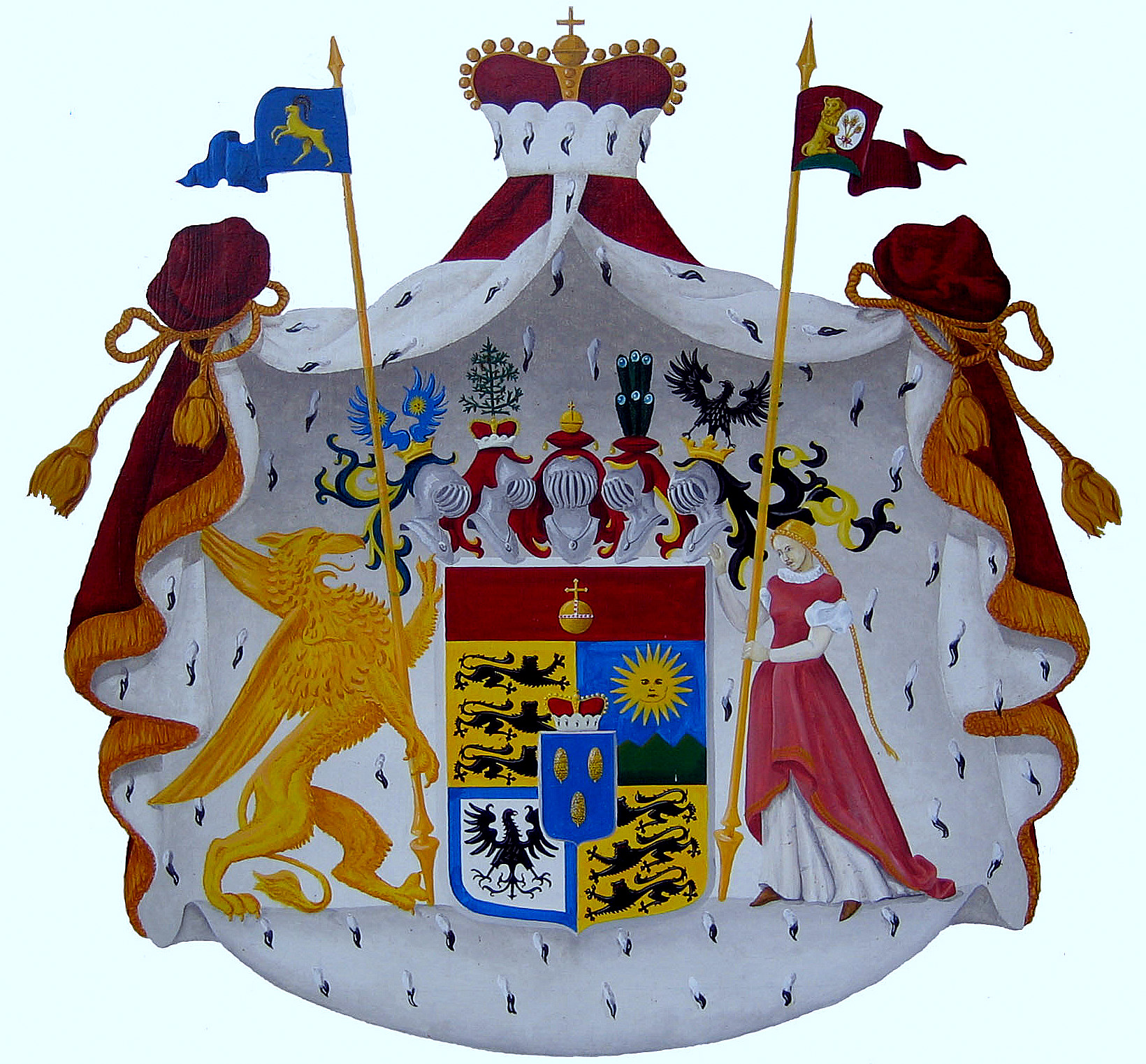 Großes Wappen aller Mitglieder der fürstlichen Familie Waldburg, fotografiert im Palast Hohenems